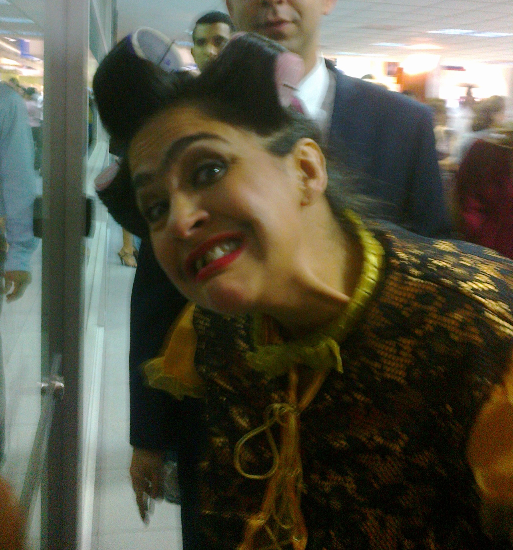 La Mofle sonriendo para la foto en el Centro de Convenciones de Guayaquil luego de su monólogo de humor llamado, Moflólogo. Es un personaje ecuatoriano muy conocido, interpretado por la actriz Flor María Palomeque.